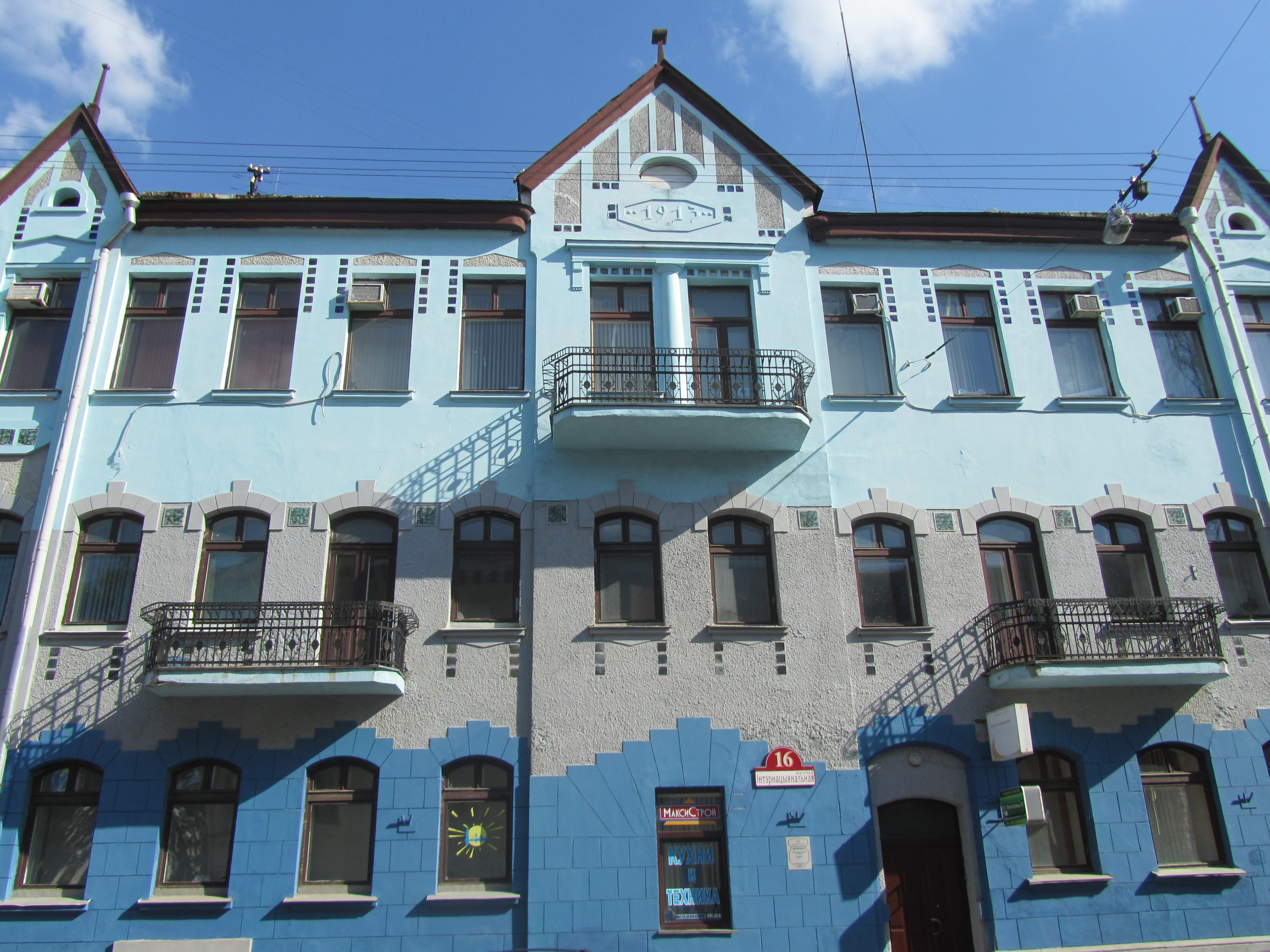 Беларуская (тарашкевіца): Гістарычны цэнтар г. Менску: будынкі і збудаваньні, пляніровачная структура, ляндшафт і культурны пласт. г. Менск This is a photo of Belarusian heritage monument. Reference number: 711Е000001 ( WLM)